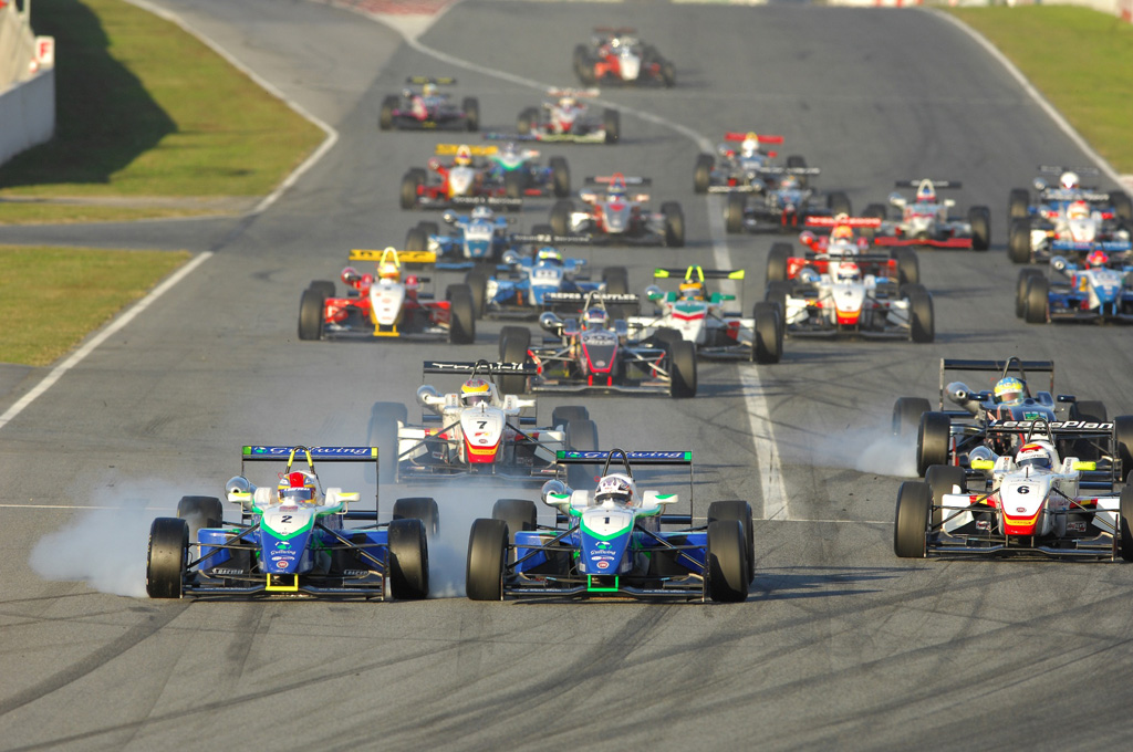 Salida en Montmelo